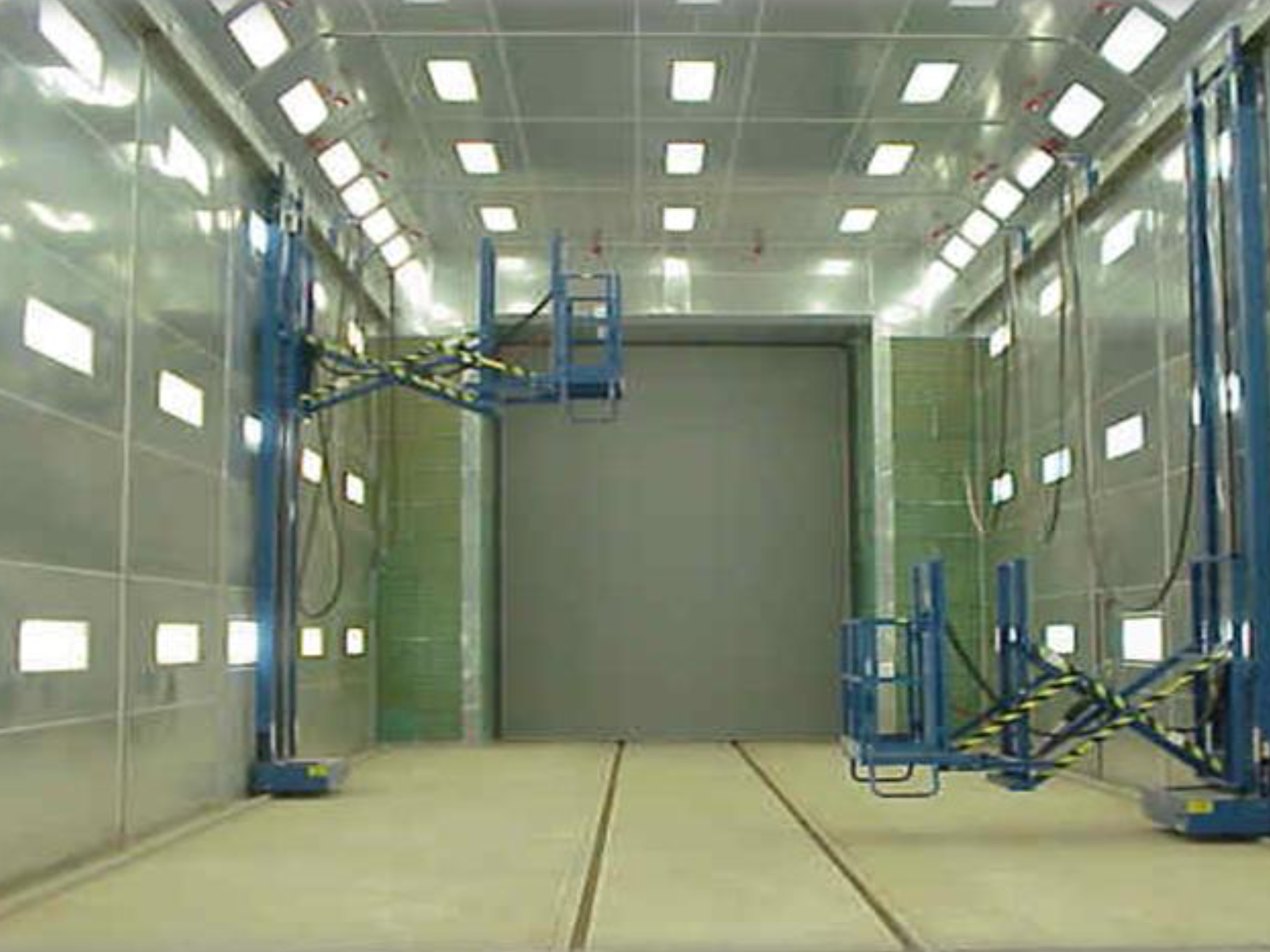 A cabine de pintura é pressurizada com ventilação por insuflamento e exaustão com fluxo de ar descendente por pressão positiva, onde o ar é impulsionado pelo teto e retirado pelo piso, denominado Down-Draft.